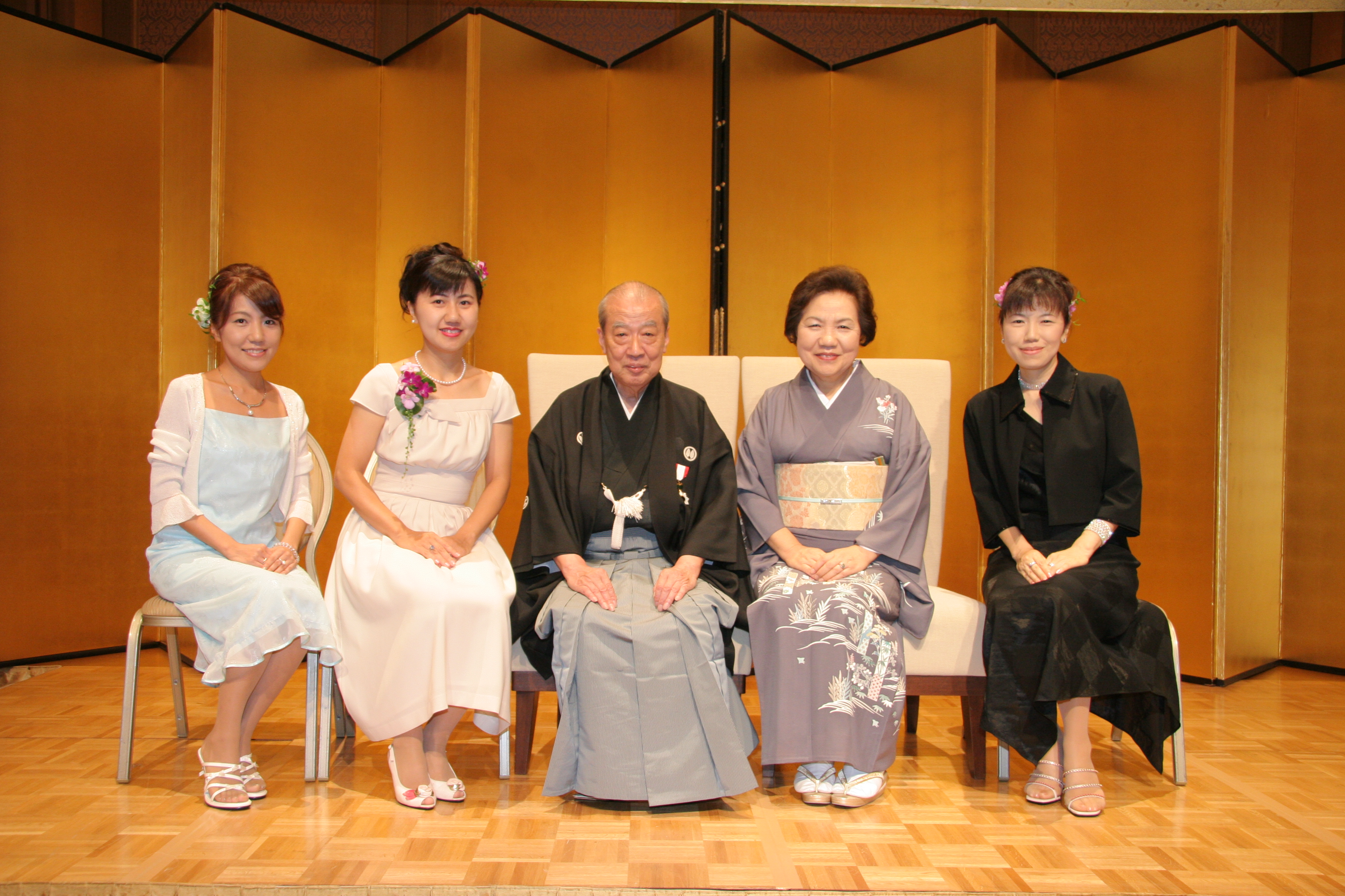 受賞祝賀パーティにて家族で撮影